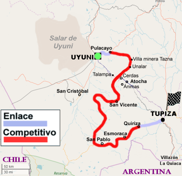 Dakar Rally 2018. Mapa de Etapa 8. Uyuni-Tupiza.